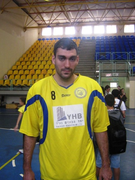 טל דן במדי מכבי אשדוד tal dan in maccabi ashdod